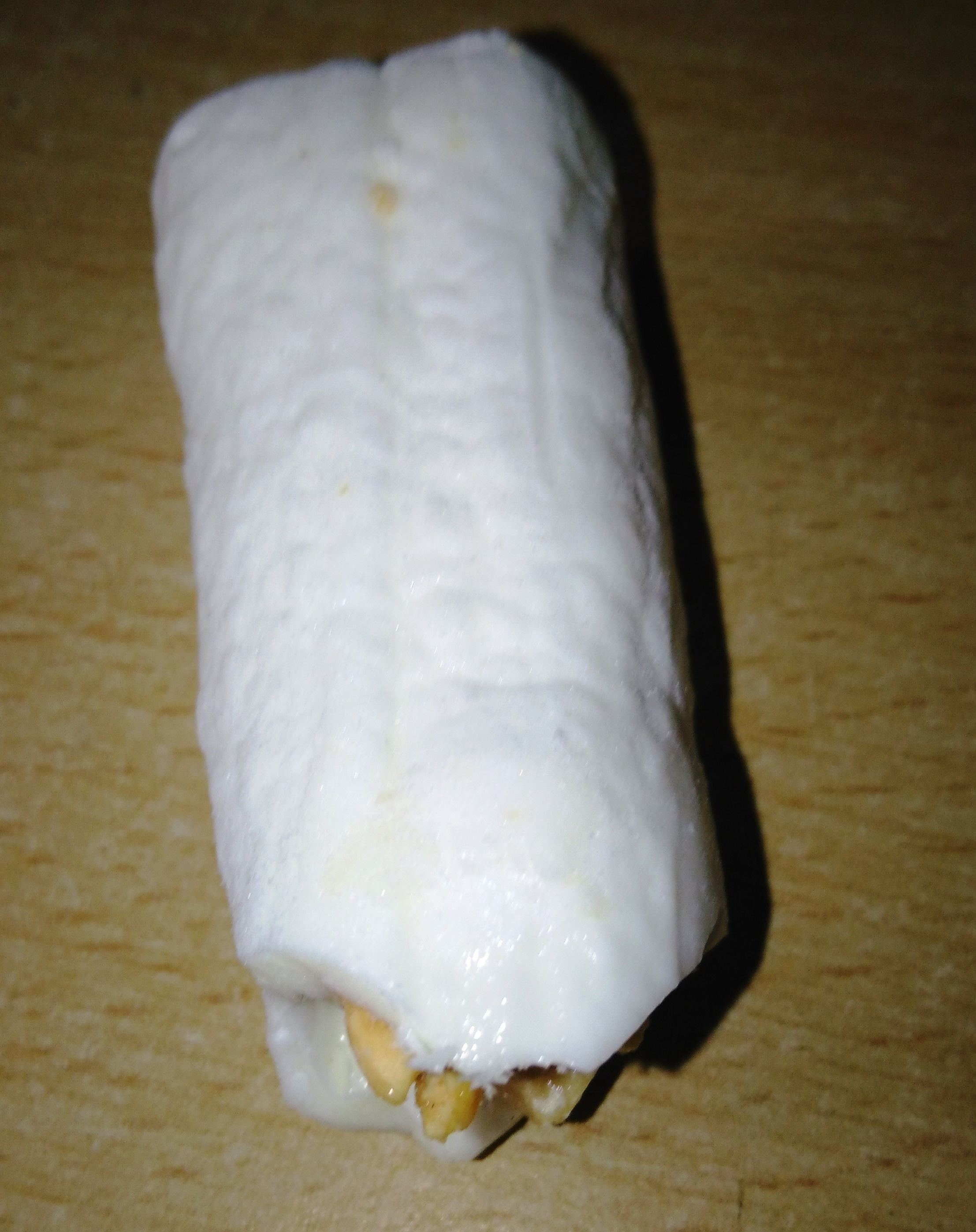 Kẹo kéo Việt Nam, tháng 8 năm 2018